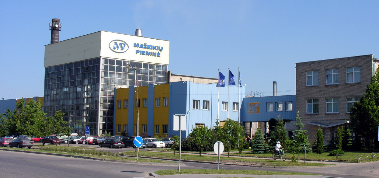 UAB „Pieno žvaigždės" Mažeikių pieninė Foto: Algirdas, 2006 m. birželio 14 d.